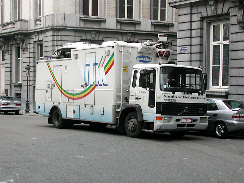 "Spacelink" satelliet-communicatiewagen van VTM. Brussel, 2001. Eigen foto. Volvo FL6 14.